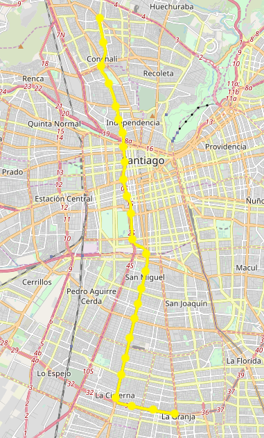 Plano del trazado del proyecto original de la Línea 2 del Metro de Santiago, de acuerdo al proyecto BCEOM-SOFRETU-CADE de 1968.